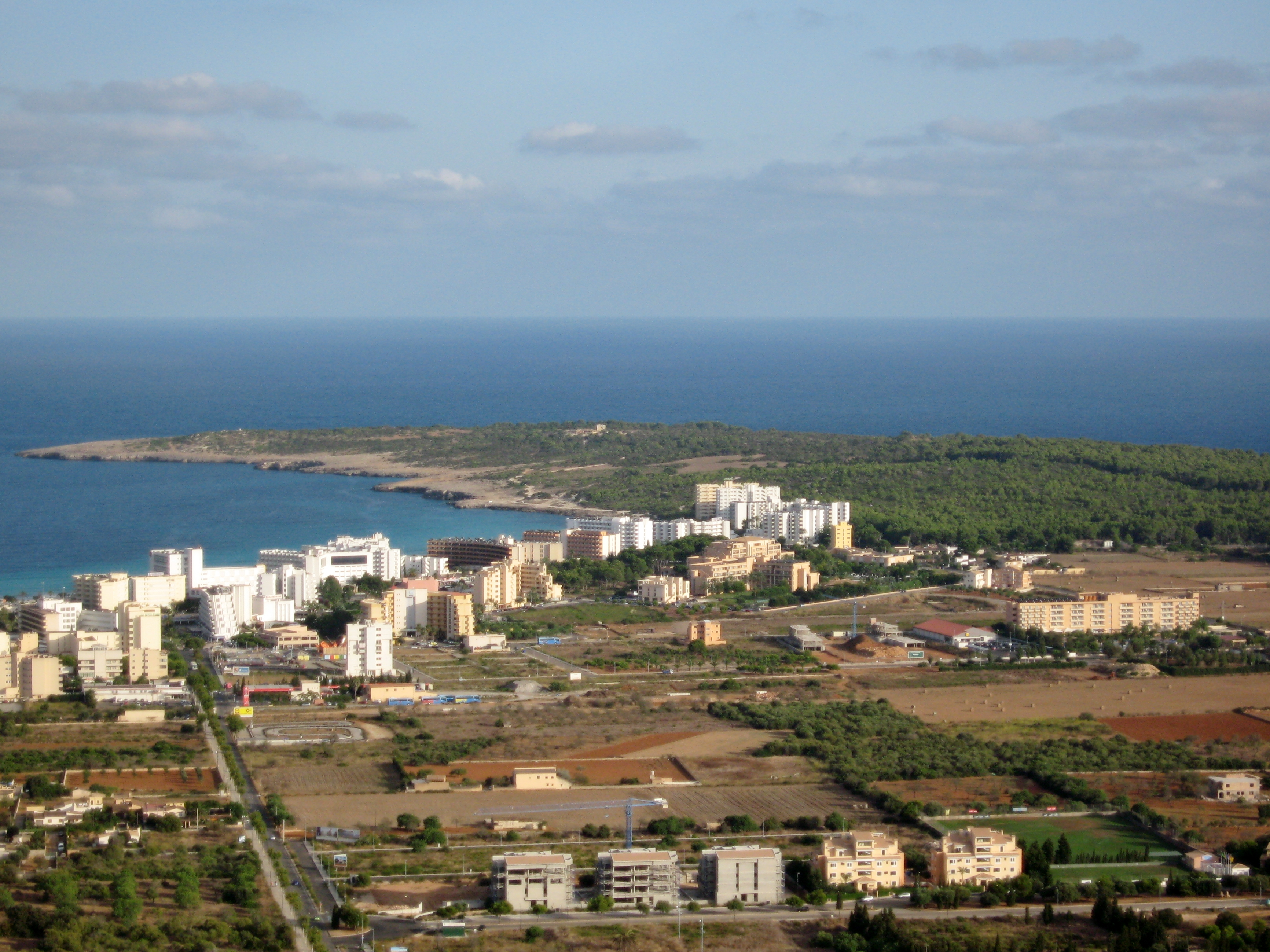 Blick auf die Halbinsel Punta de n'Amer, Gemeinde Sant Llorenç des Cardassar, vom Berg Na Penyal, Mallorca, Spanien